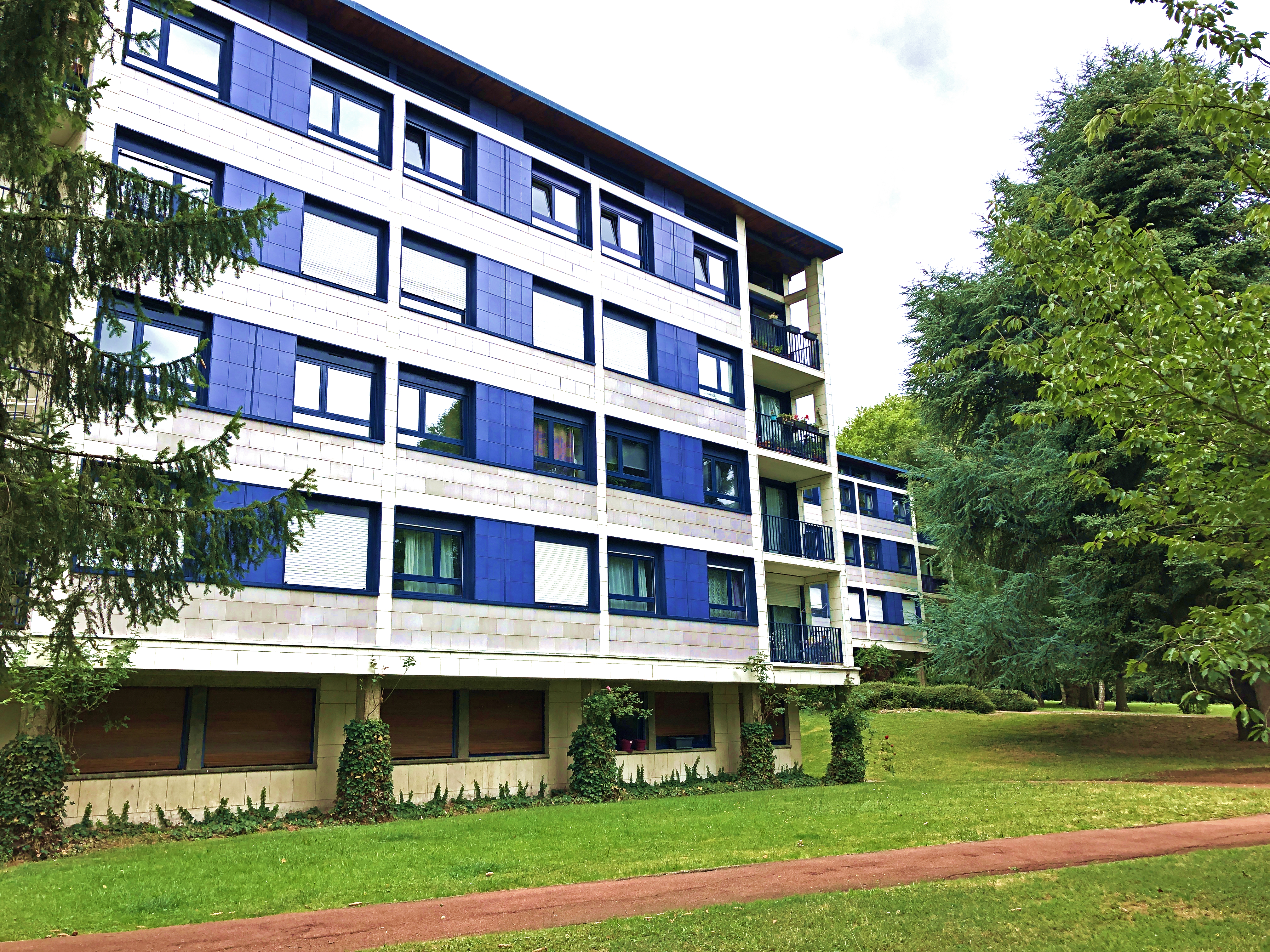 Immeuble de la Résidence du parc à Louveciennes